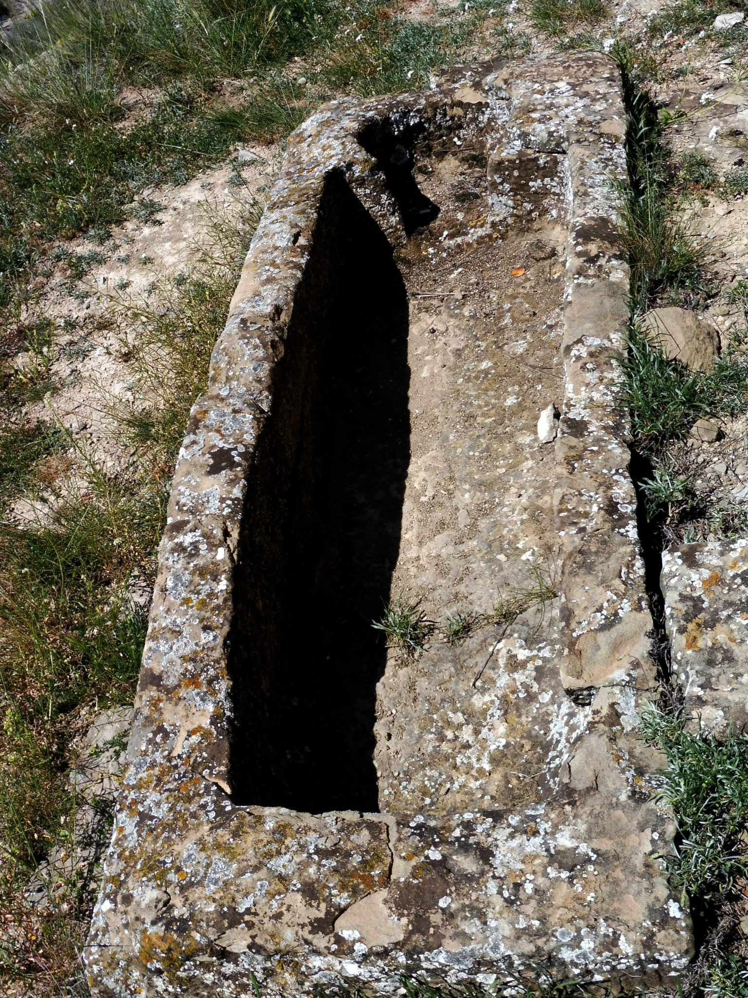 Sant Miquel de Tudela (Cervera): sepulcre antropomorfe